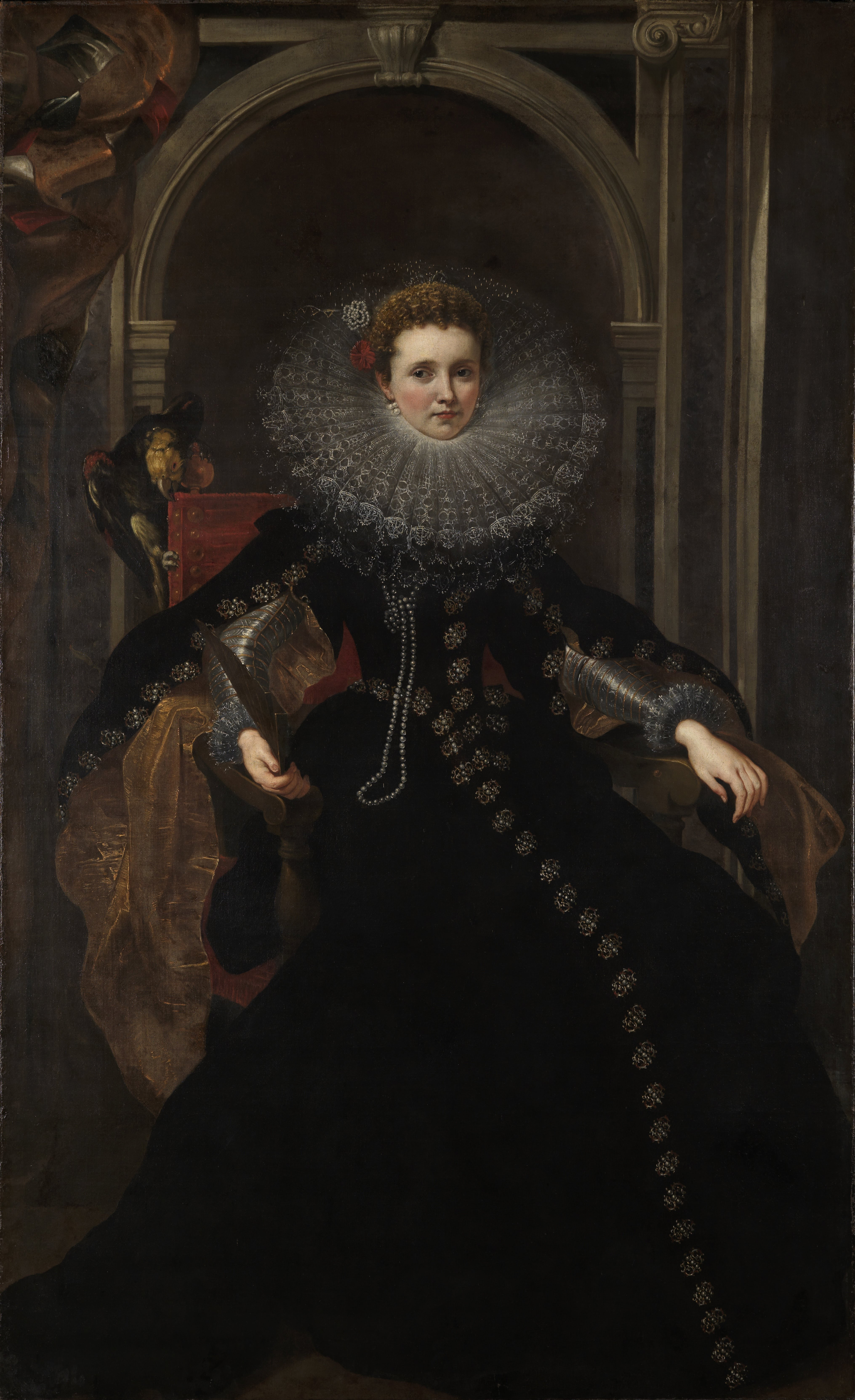 Raubkunst; Ausgleichszahlung an die Erben 1954